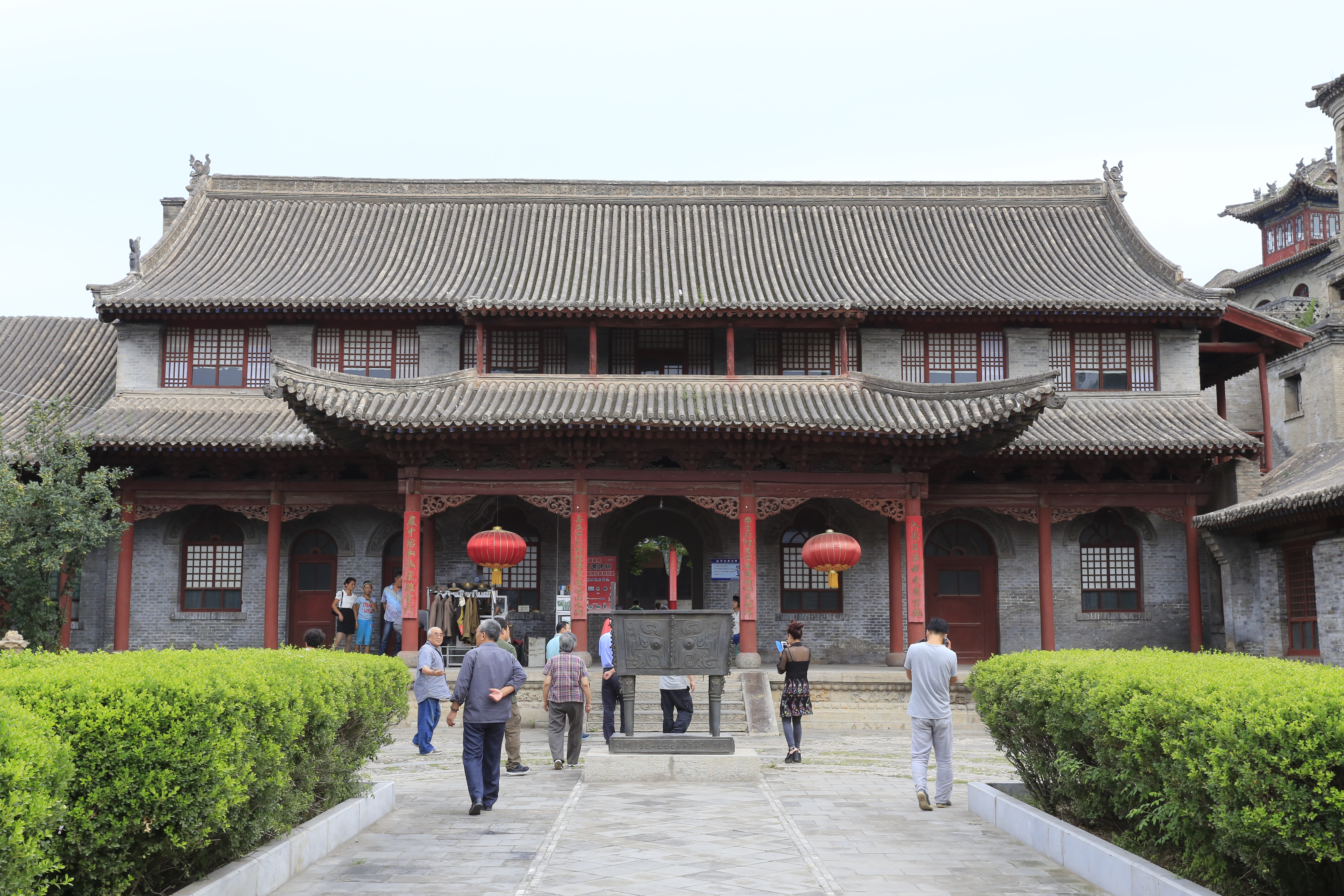 定襄县河边村阎锡山旧居—— 第一进院的正厅